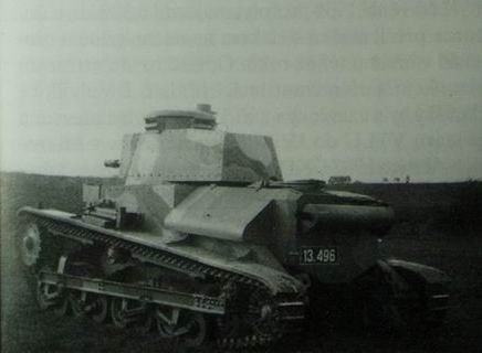 Česky: Tank LT-34